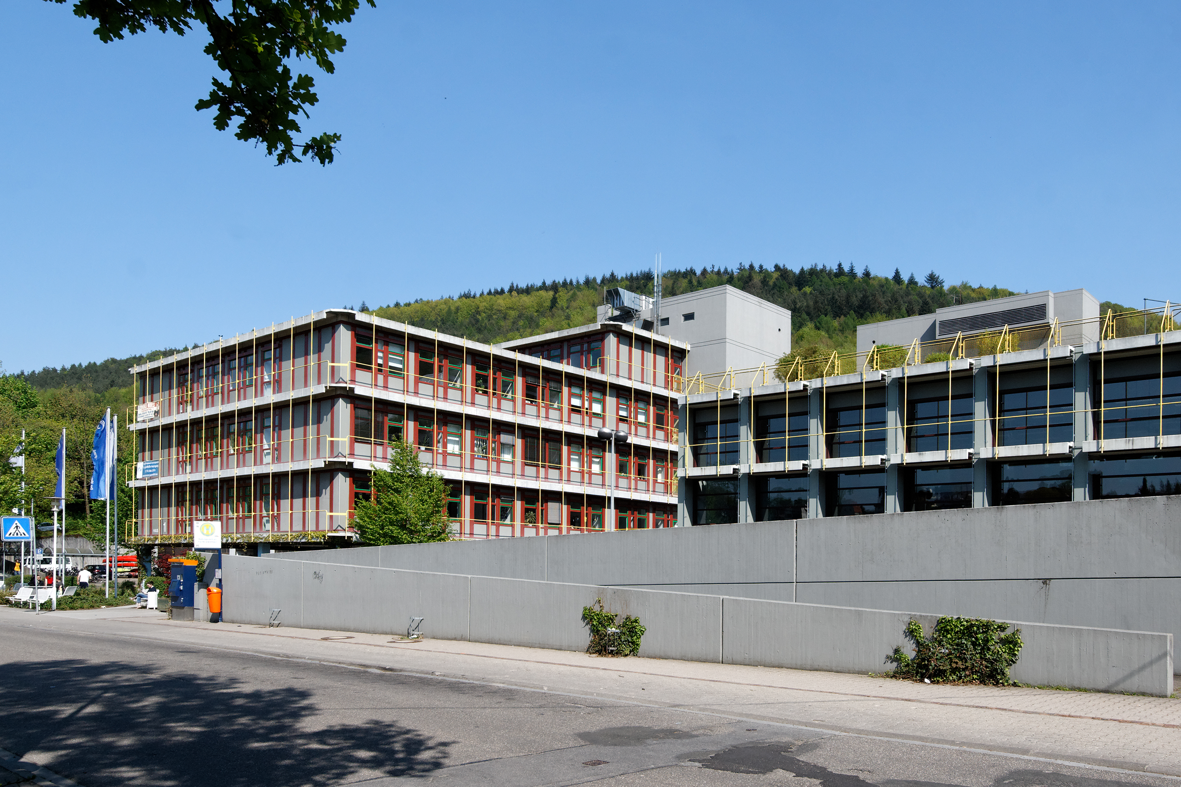 Berufsbildungswerk Neckargemünd GmbH